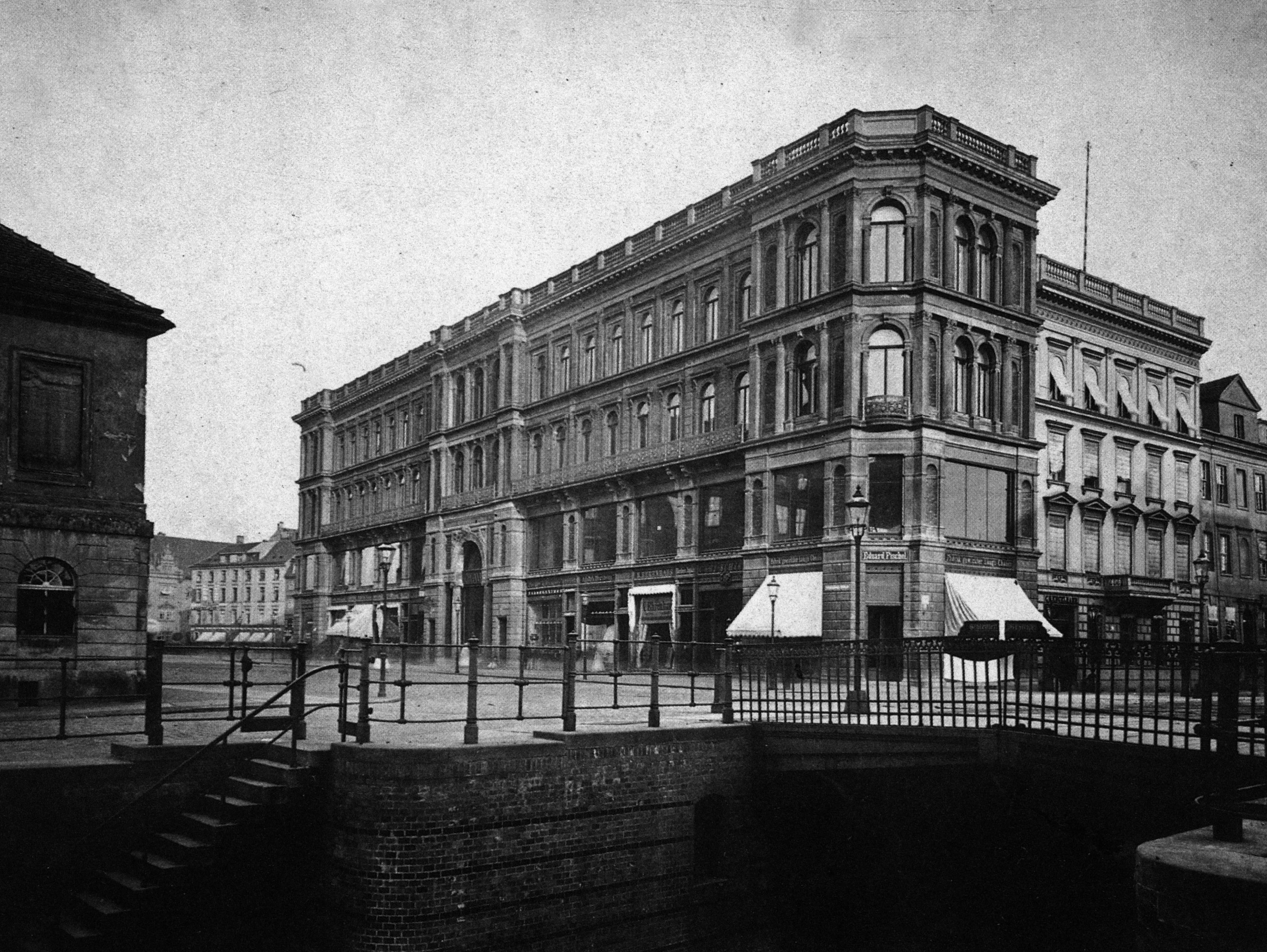 Die sogenannte „Rote Burg“ oder „Rotes Schloß“ (wegen der roten Verklinkerung) war ein Wohn- und Geschäftshaus in der Straße An der Stechbahn in direkter Nachbarschaft zum Berliner Stadtschloß (im Vordergrund die Schleusenbrücke). Das Gebäude wurde 1935 teilweise abgebrochen, die Reste im Zweiten Weltkrieg zerstört.